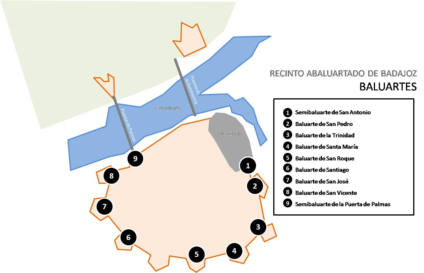 Recinto Abaluartado BADAJOZ- BALUARTES- sin calles (2)